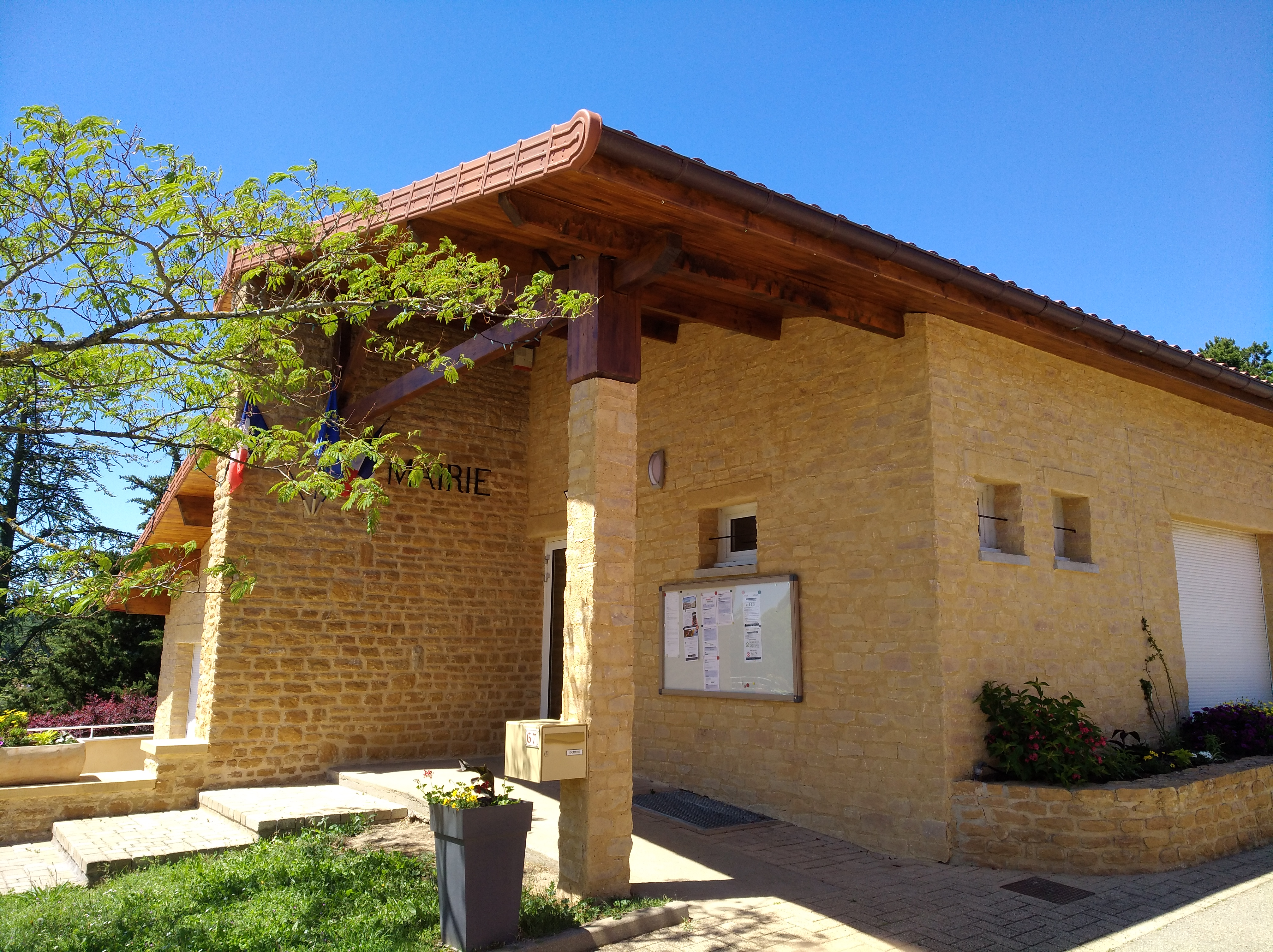 Mairie de Saint-Jean-des-Vignes, dans le département du Rhône (France).